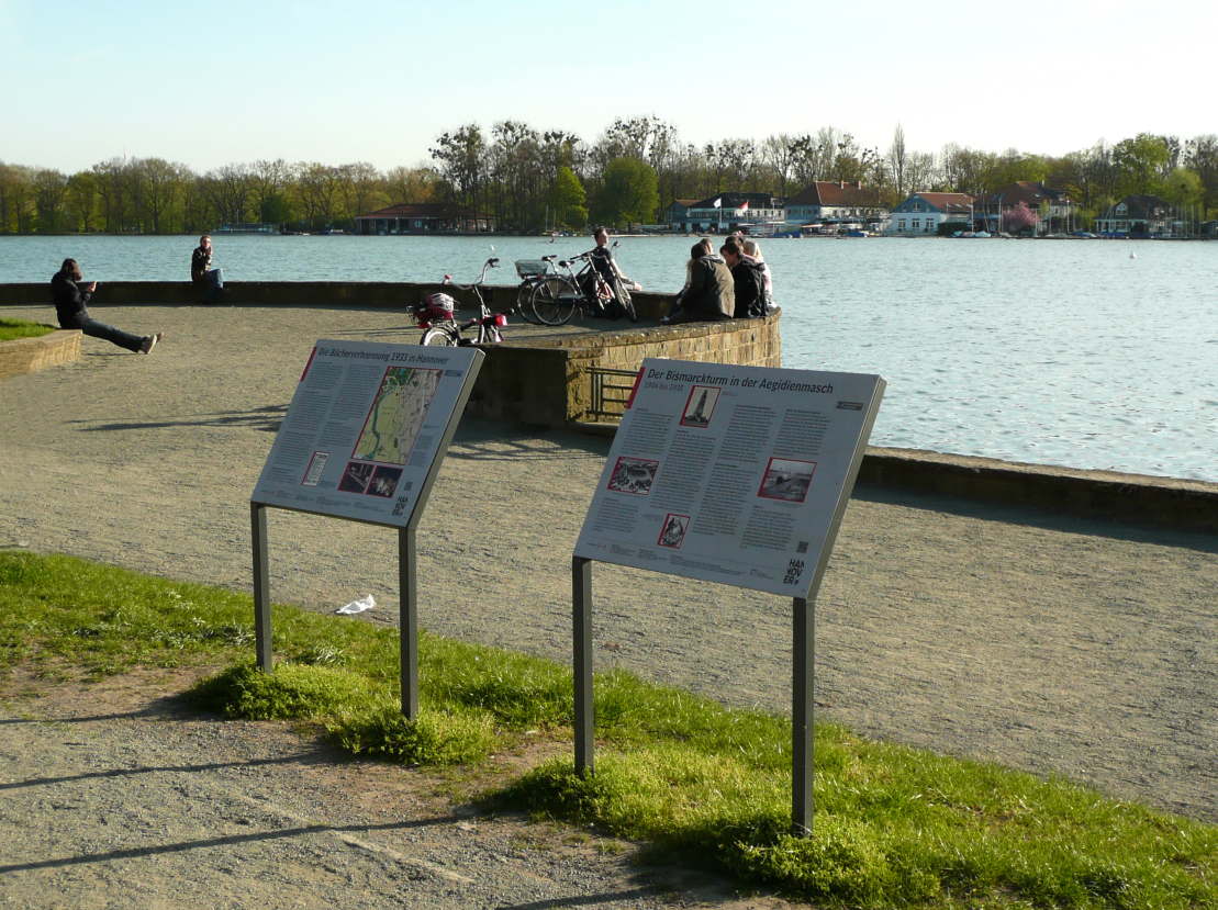 Infotafeln am Maschsee bei der Geibelbastion zur Bücherverbrennung und zum Bismarkturm